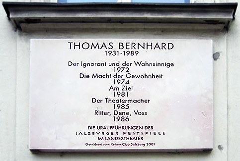 Diese Gedenktafel am Salzburger Landestheater erinnert, dass wichtige Uraufführungen von Thomas Bernhard-Stücken an diesem Theater erfolgt sind.